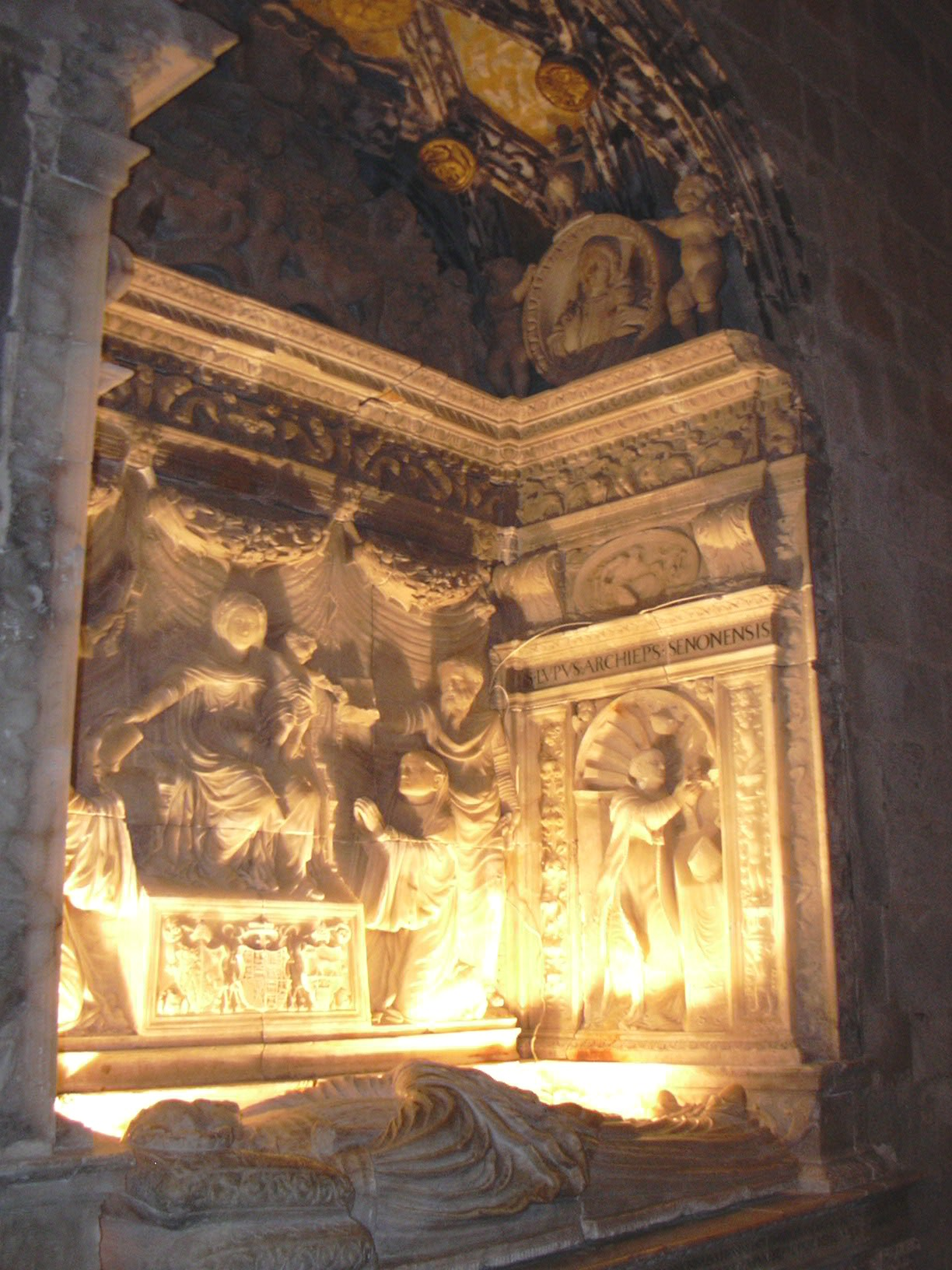 Veruela - Sepulcro del abad Lope Marco - Atribuido a Pedro de Moreto h. 1552-1553